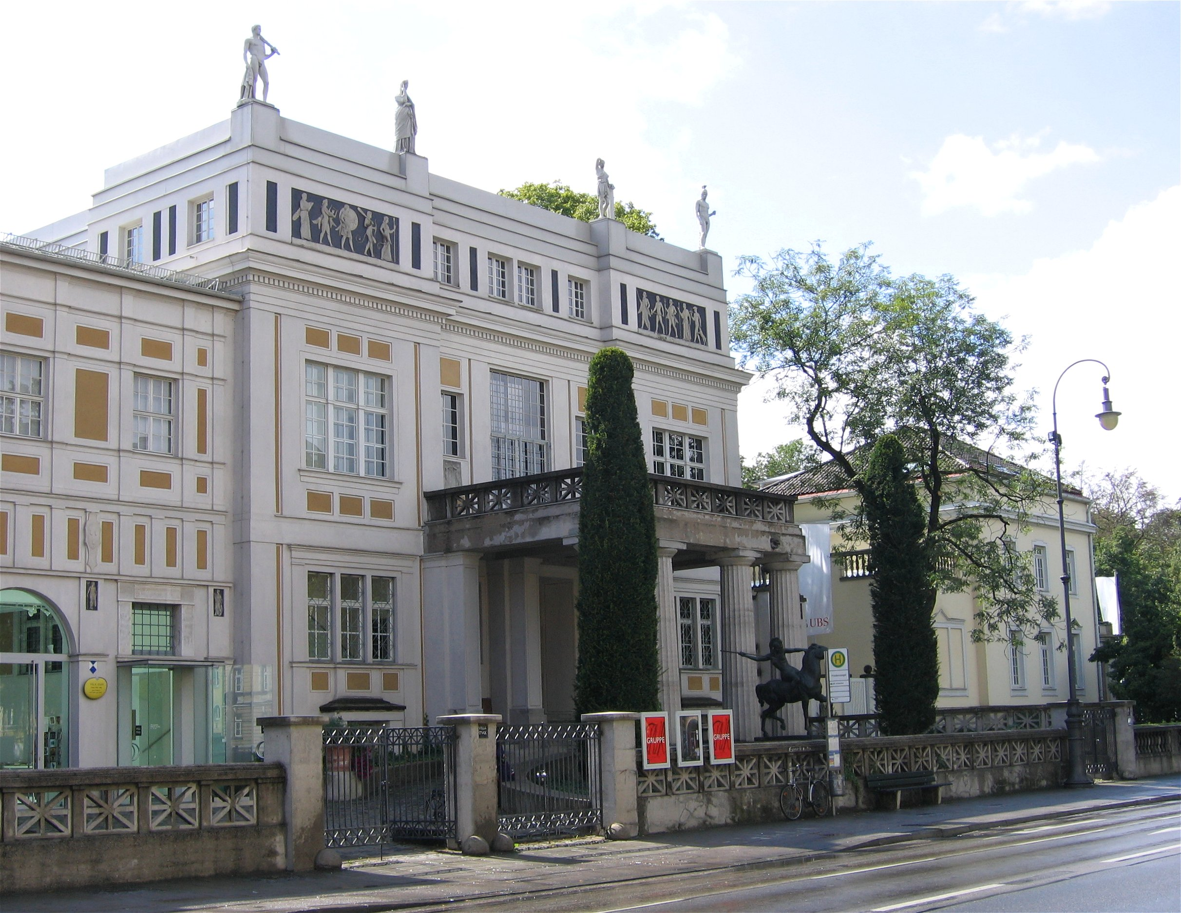 Villa Stuck, München